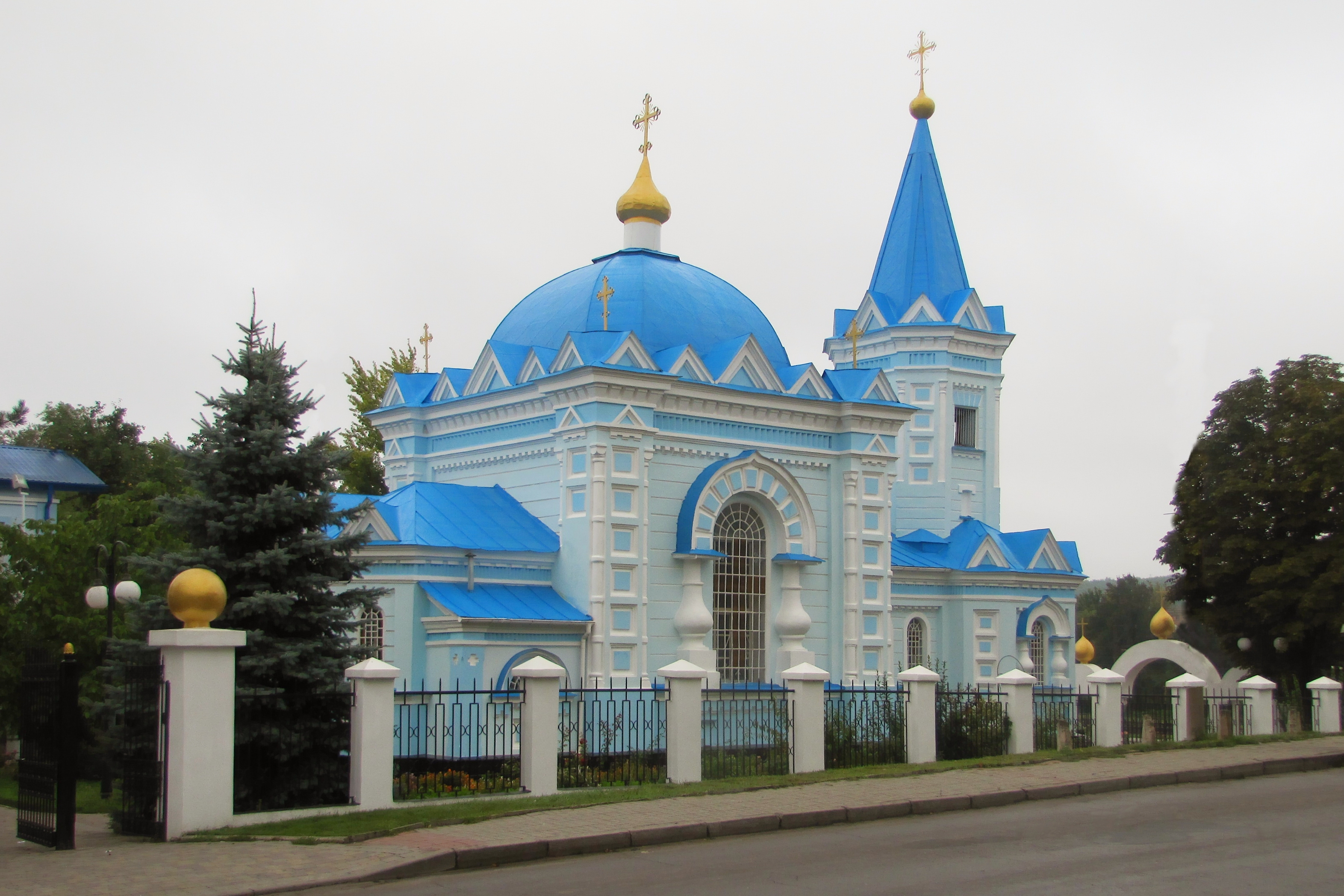 Церква Константино— Оленівська, Харків, вул. Котлова, 199